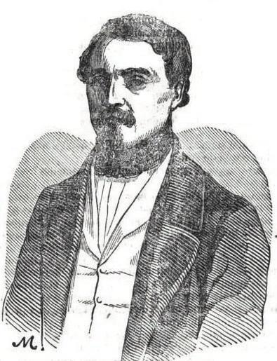 Martin Bernard